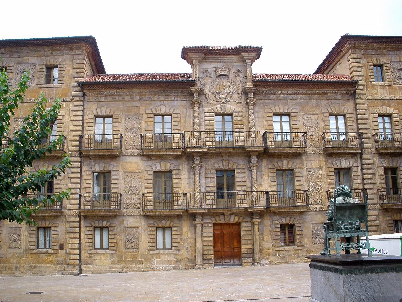 Aviles - Palacio del Marques de Camposagrado (Escuela Superior de Arte de Asturias)